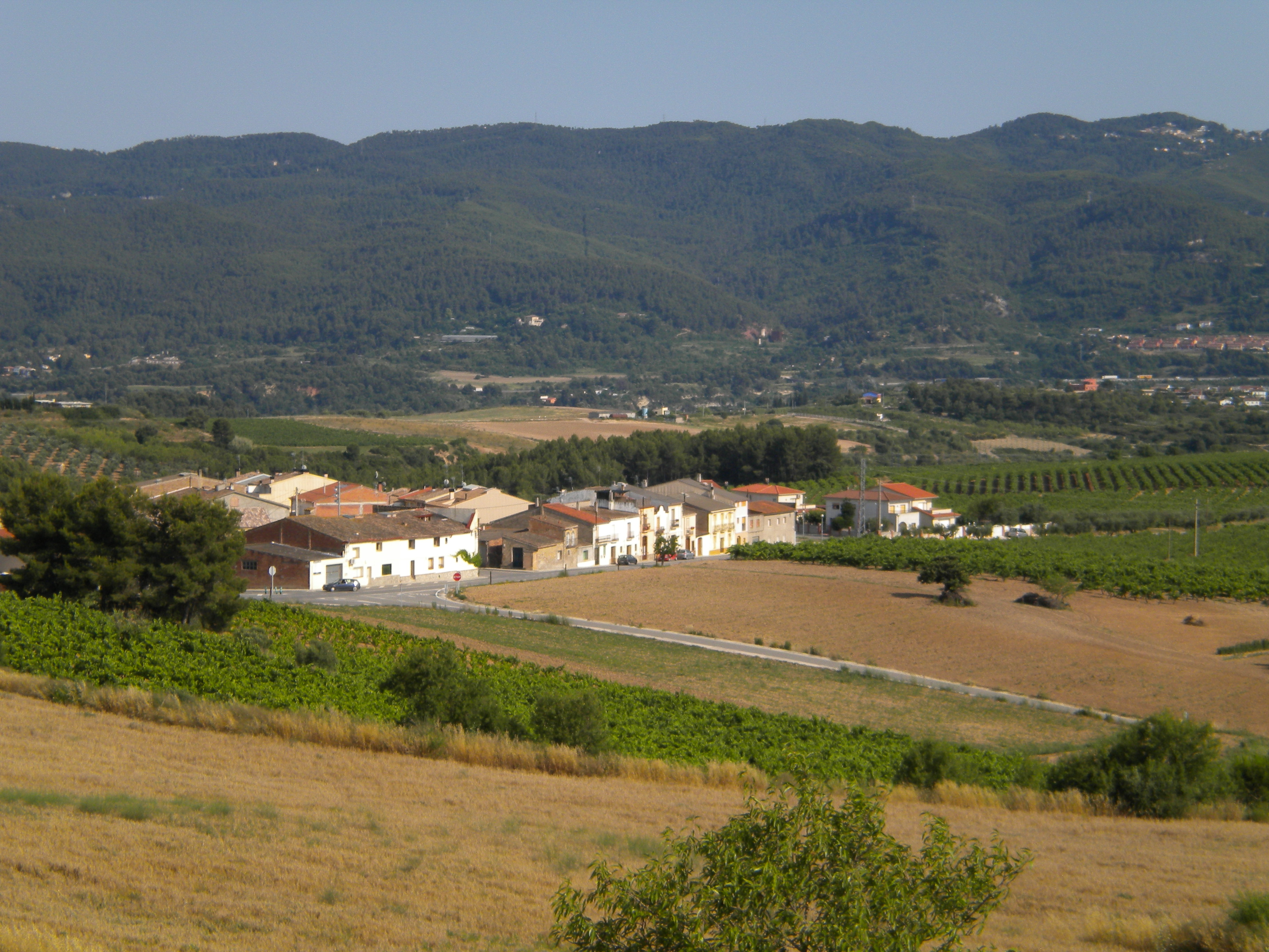 Vista de la vall de Sant Llorenç d'Hortons. Des del turó del Pi Gros, amb el llogaret de Sant Joan Samora en primer terme.